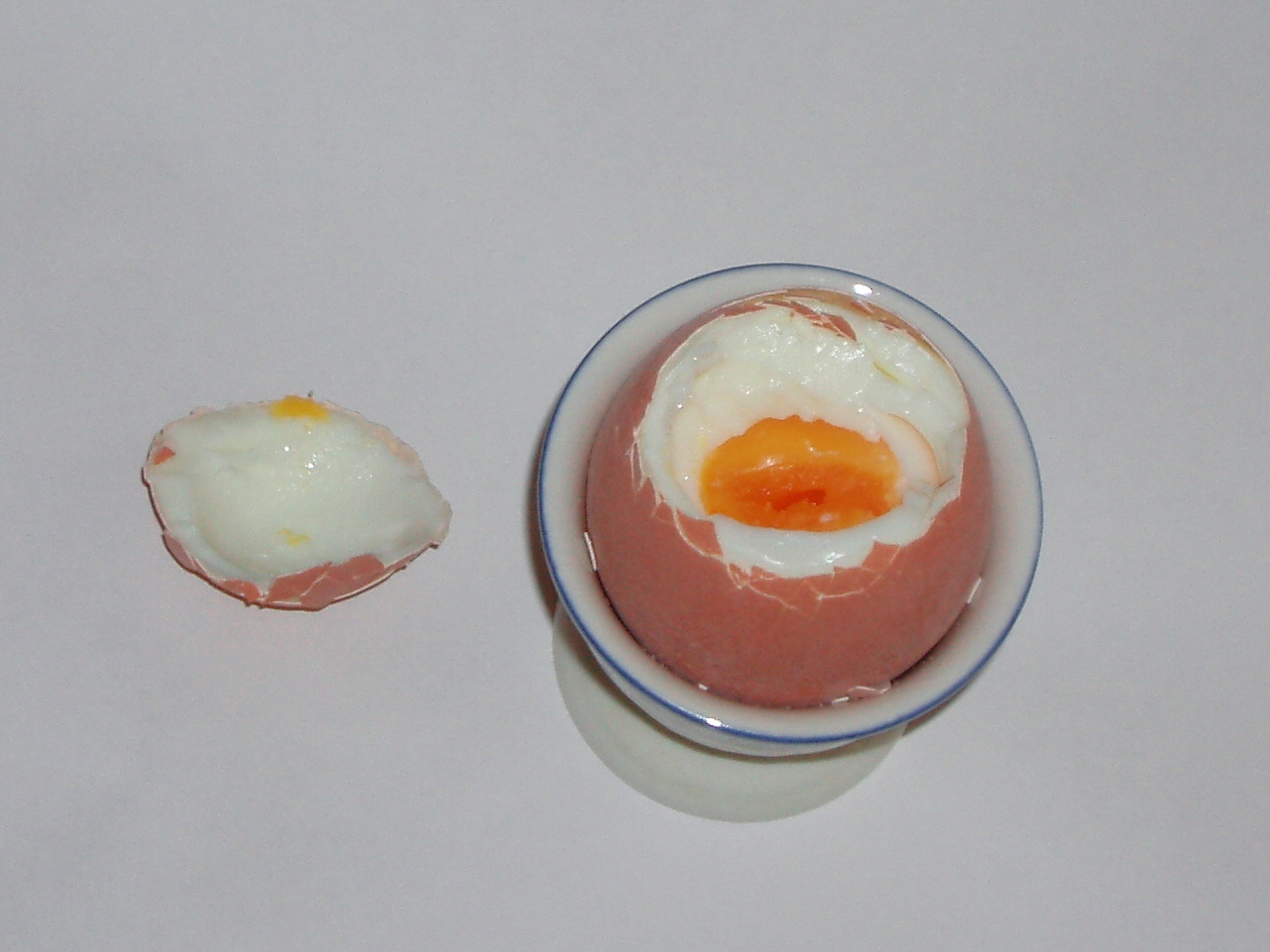 weichgekochtes Hühnerei